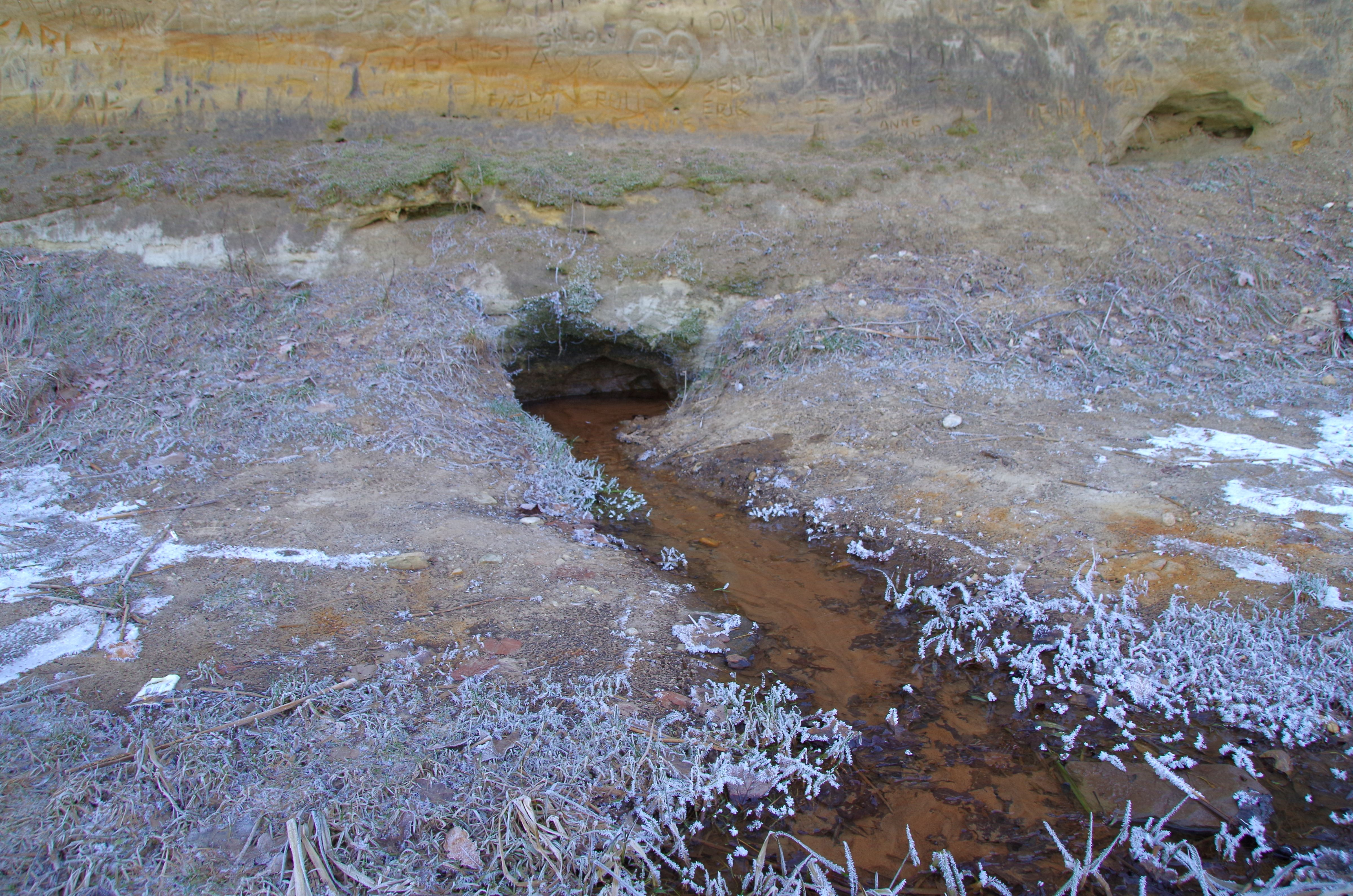 Tori põrguallikas on allikas Pärnu jõe orus. Allikast 50 m allavoolu jääb Tori põrguks nimetatud koobas.